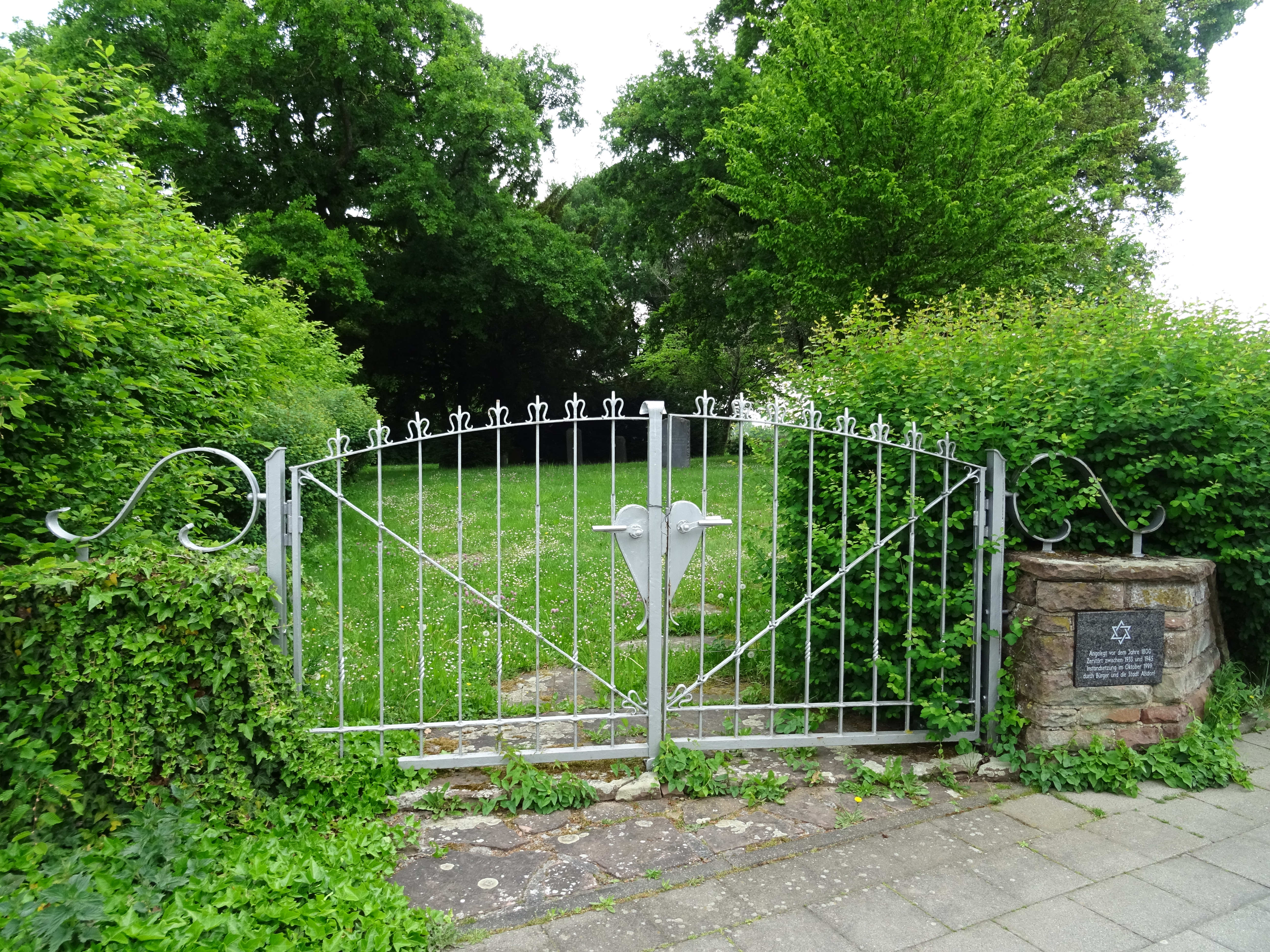 Baudenkmal, Jüdischer Friedhof Begau